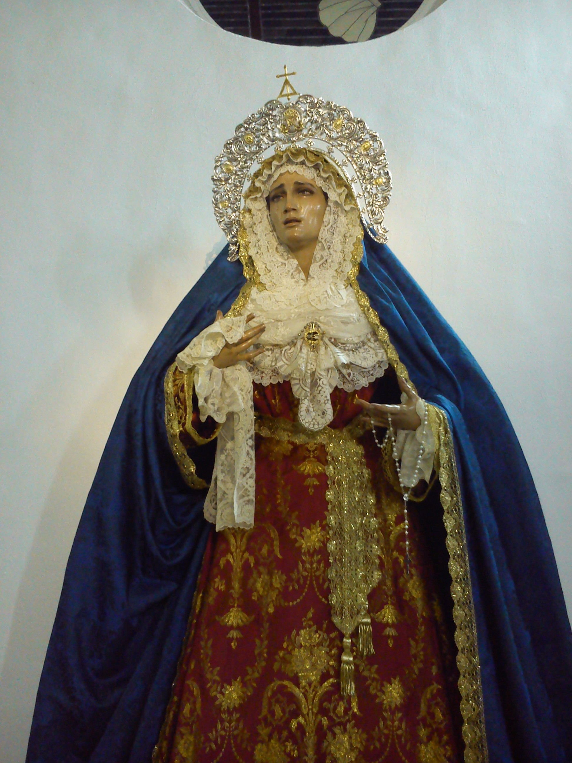 Imagen de la Virgen de la Trinidad que se venera en la parroquia de Santa Isabel de Jaén. Es obra de Francisco Romero Zafra en 2009.